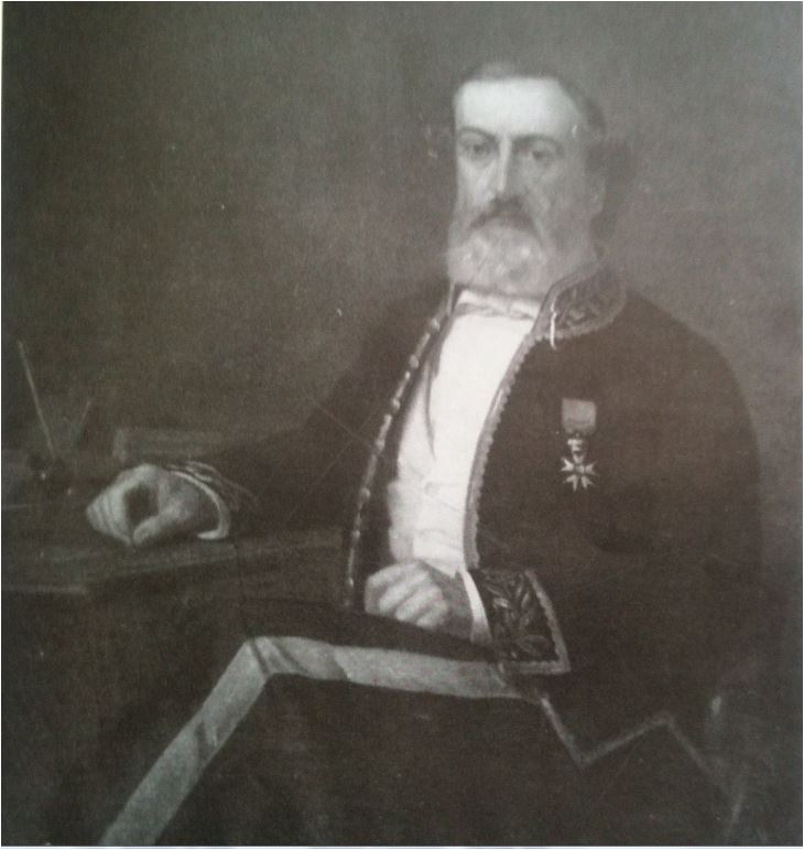 Jean Louis François Richard-Vitton. Photographie noire et blanche du portait d’un homme assis de trois-quart vêtu de la tenue d’apparat de maire du second empire et portant la décoration de Chevalier de la Légion d’honneur.